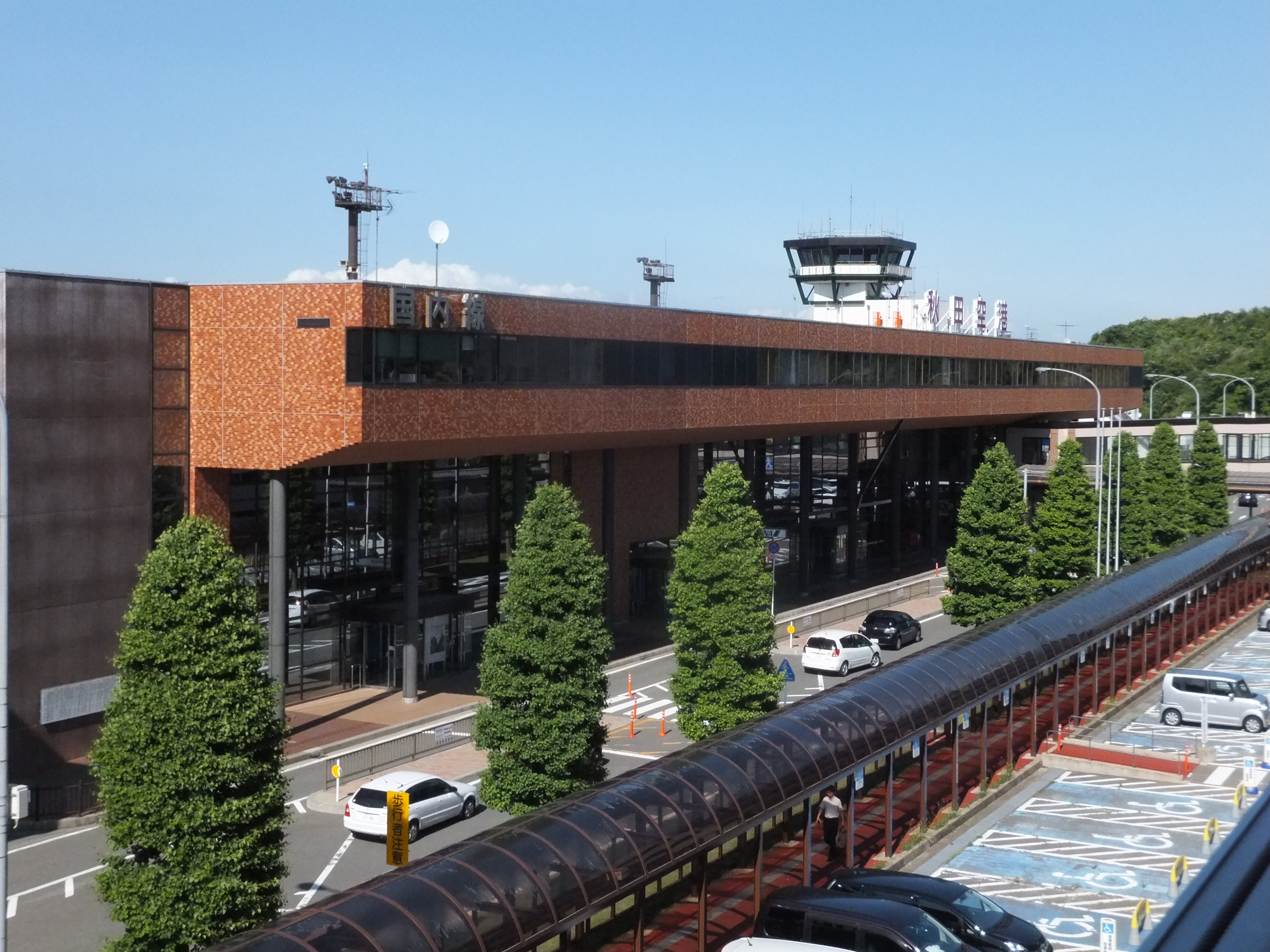 秋田空港国内線ターミナル